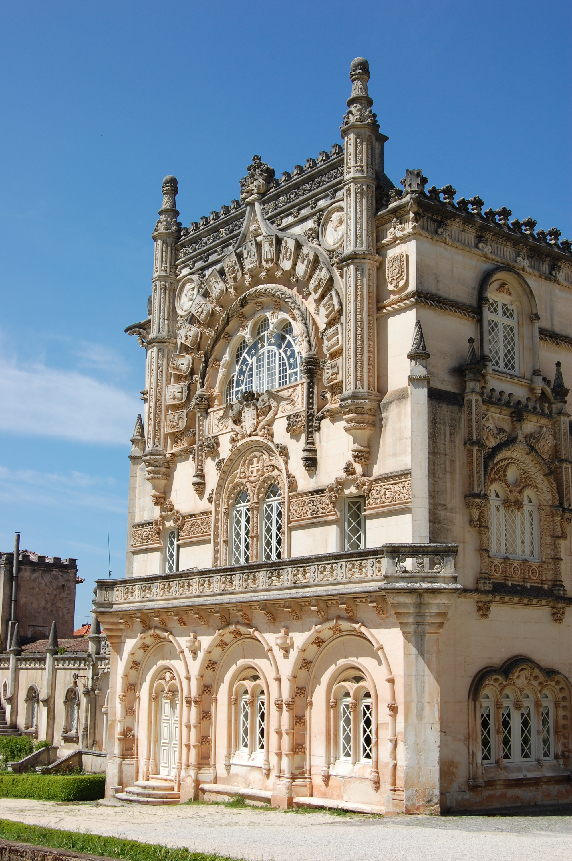 Uma das alas do Palace Hotel do Buçaco